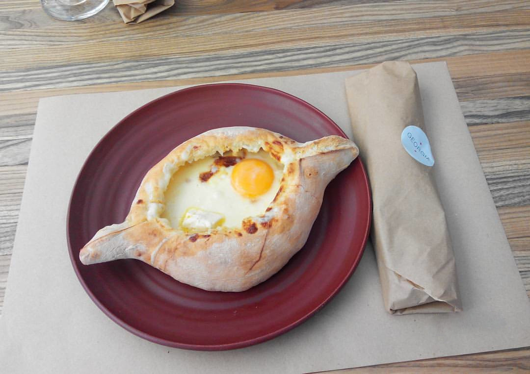 Вкусный грузинский хачапури ) #хачапури #georgia_kh